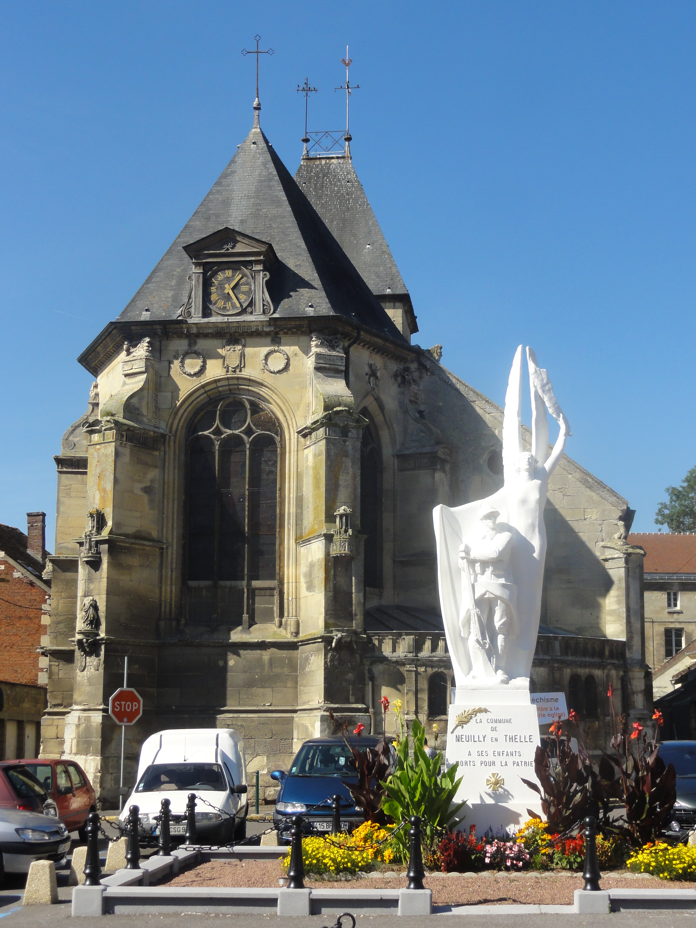 Chevet.